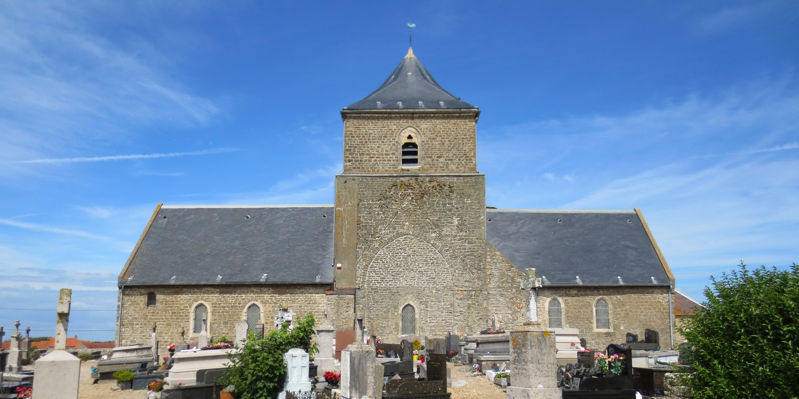 Audresselles